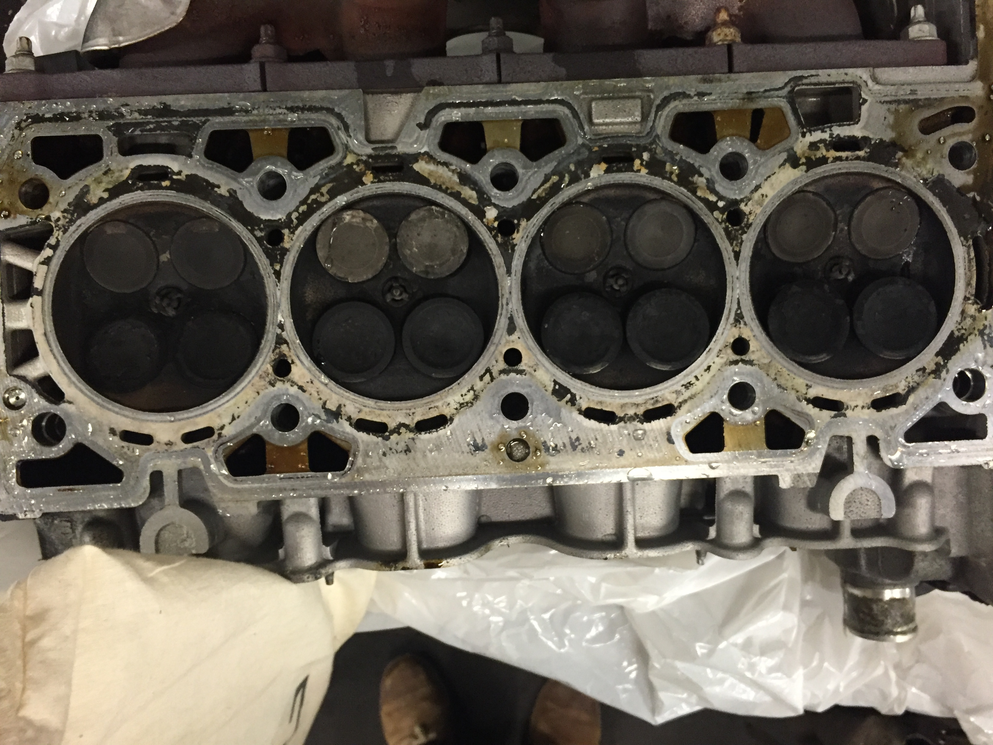 Zylinderkopf Motor Z22SE nach Steuerkettenriß